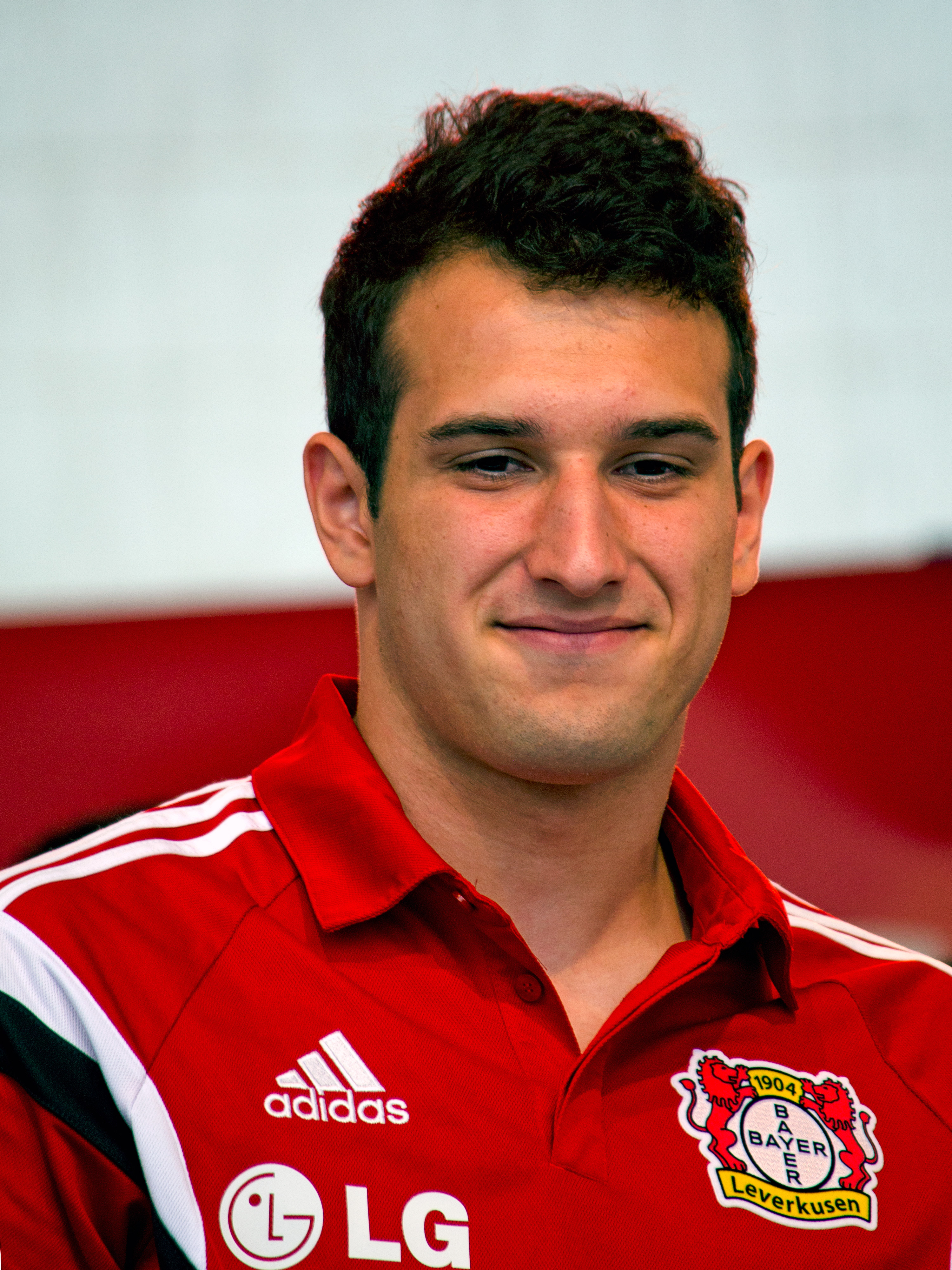 Levin Öztunali, deutscher Fußballspieler